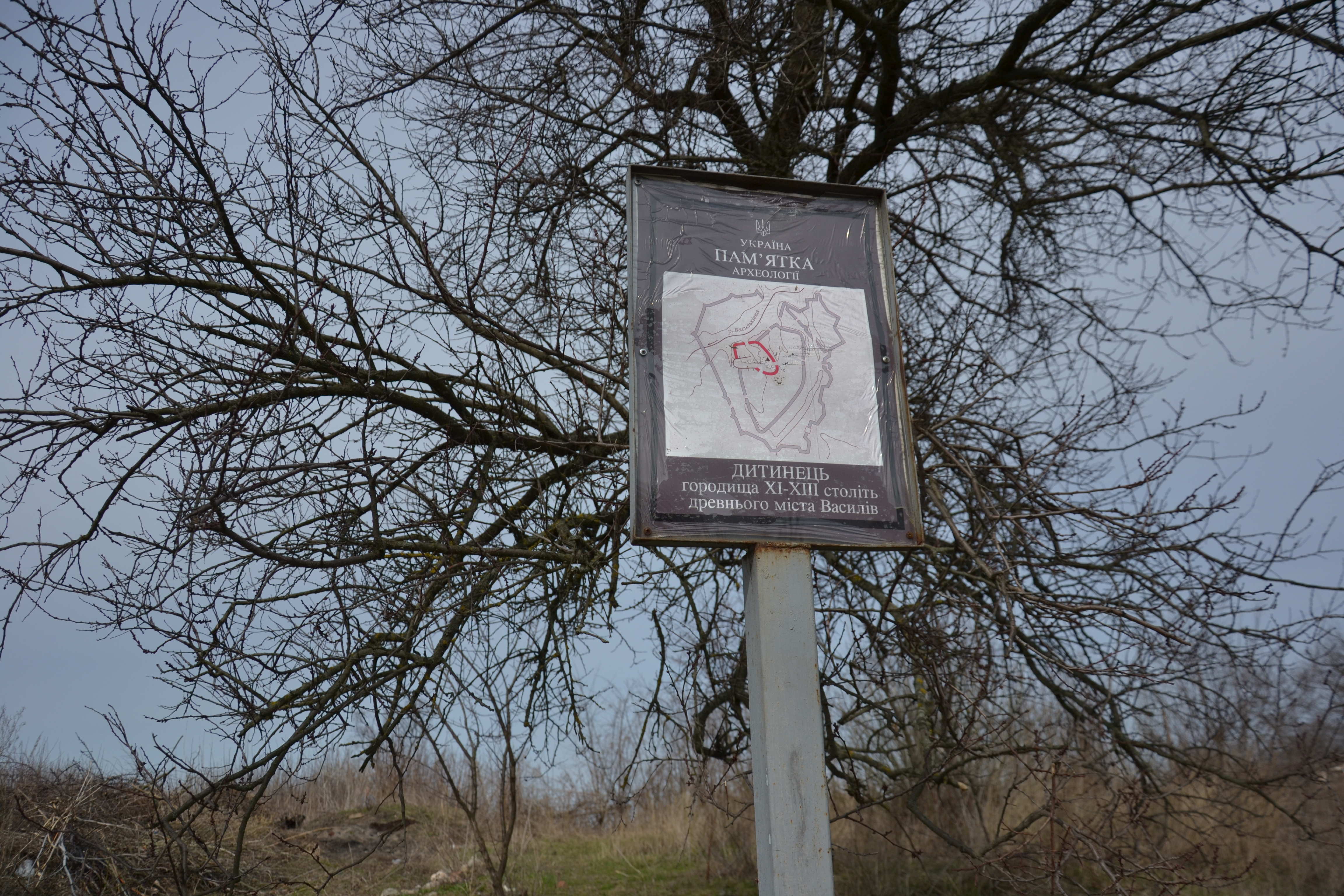 Давньоруське городище Василів (м.Васильків), меморіальна табличка